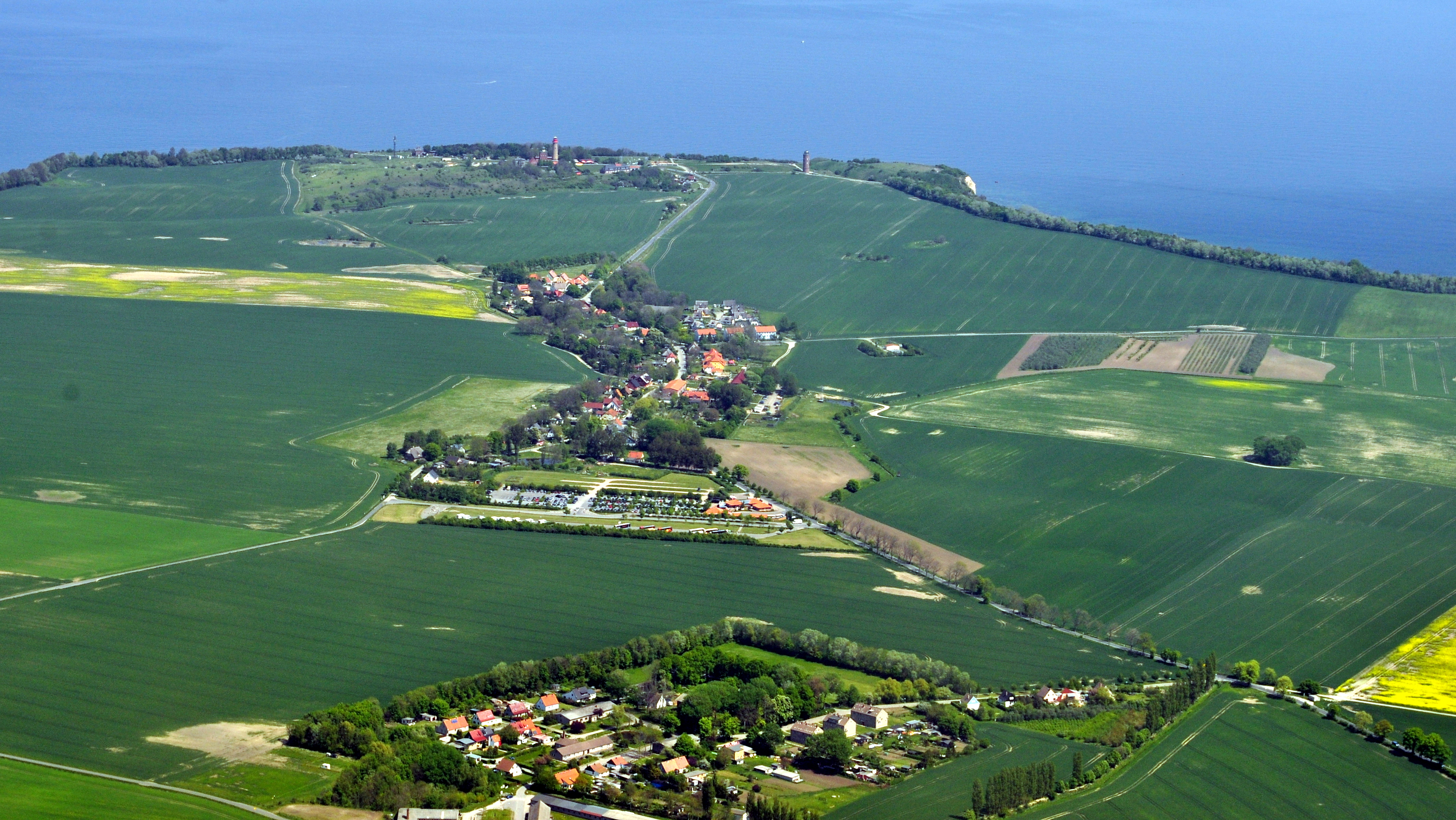 Die Bilder wurden von mir während eines einstündigen Rundflugs ab Flugplatz Güttin am 21. Mai 2011 aufgenommen. Die Bildbeschreibung steht im Dateinamen. Aufgenommen mit einer Nikon D5000 durch das Seitenfenster des Flugzeugs.